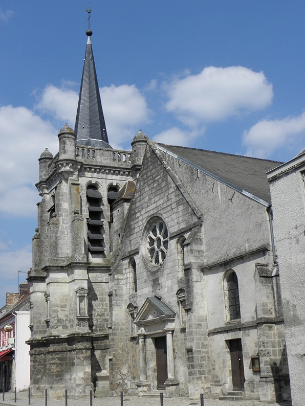 Église Saint-Nicolas de La Ferté-Milon (02).